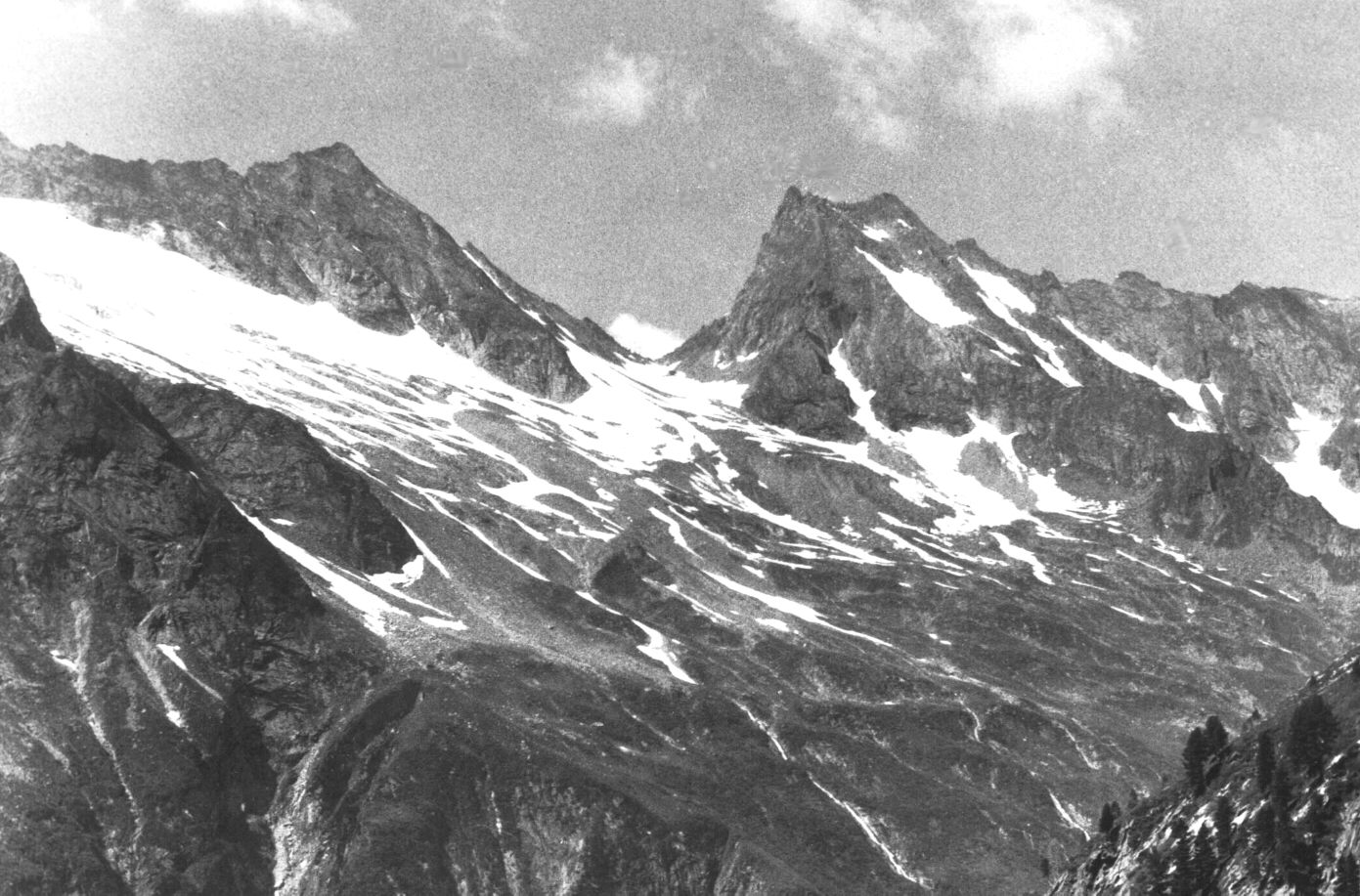 Lapenscharte mit Lapenspitze (links) und Gigalitz (rechts), Zillertaler Alpen, Österreich